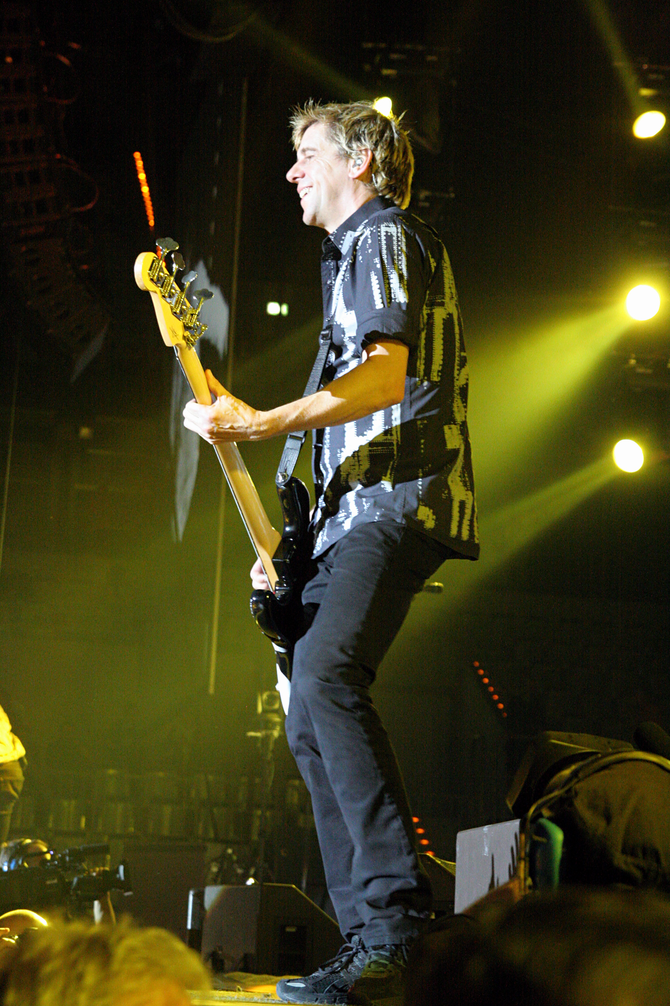 Andreas Meurer, genannt Andi, von den Toten Hosen am 15. Dezember 2012 in der SAP Arena in Mannheim.